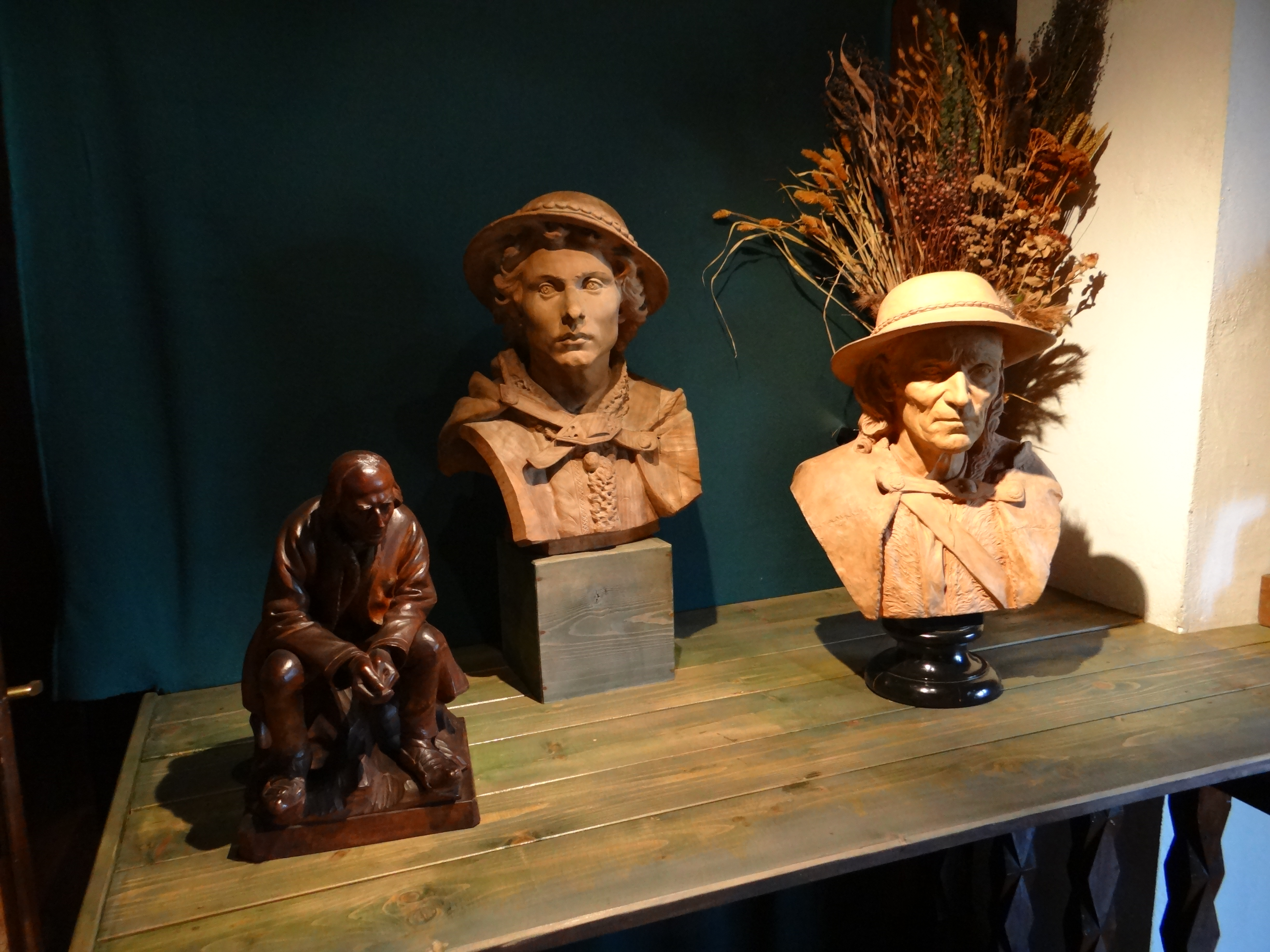 willa drewn. „Koliba” Zakopane, ul. Kościeliska 18, Zakopane